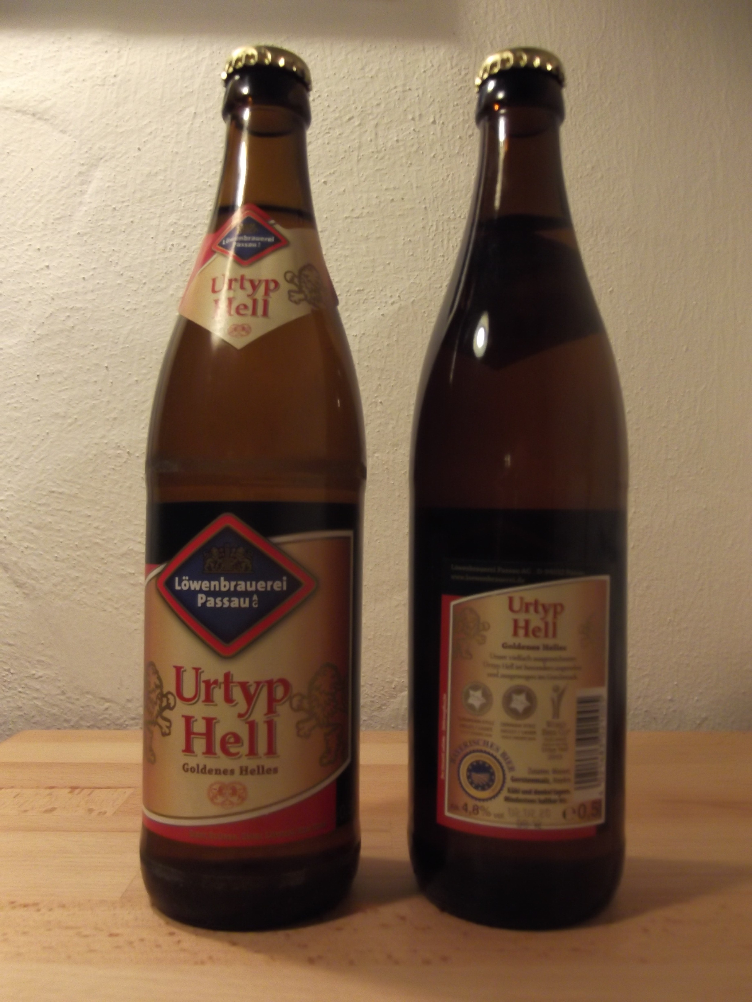 Flaschenabfüllung von Urtyp Hell - Goldenes Helles - der Löwenbrauerei Passau